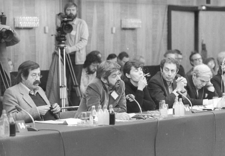 Berlin, Günter Grass, Jurek Becker, G. Baklanow, D. Granin ADN-ZB Senft 18.12.81 Berlin: An der "Berliner Begegnung zur Friedensförderung" von Schriftstellern, Künstlern und Wissenschaftlern aus europäischen Ländern vom 13. bis 14. Dezember 1982 nahmen Dr. Günter Grass (l.), Jurek Becker (2.v.l.), Grigorij Baklanow (2.v.r.) und Daniil Granin (r.) teil. Abgebildete Personen: Becker, Jurek: Schriftsteller, DDR (GND 118829742) Grass, Günter: Schriftsteller, Bundesrepublik Deutschland (GND 118541579) Baklanow, Grigorij: Schriftsteller, Sowjetunion (GND 118171674) Granin, Daniil Alexandrowitsch: Schriftsteller, Sowjetunion (GND 121371328)